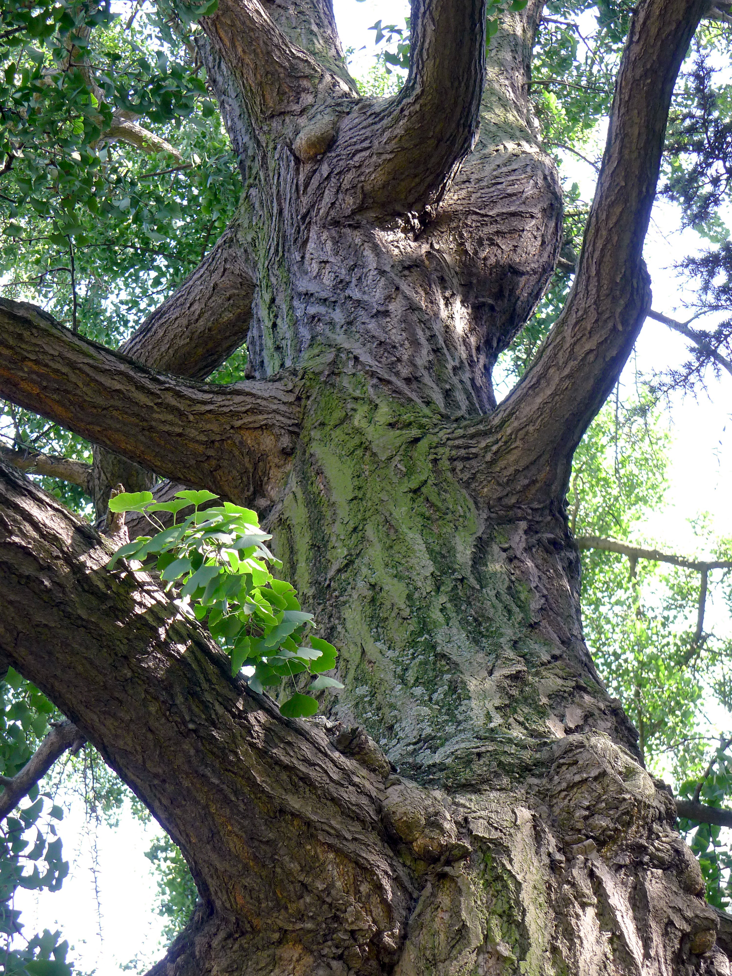 Arbre aux 40 écus (Ginkgo biloba, Ginkgoaceae) historique du jardin des Plantes - Paris V Cet arbre planté vers 1811 sur trouve sur le flanc nord de la butte du jardin, côté rue Geoffroy-Saint-Hilaire.